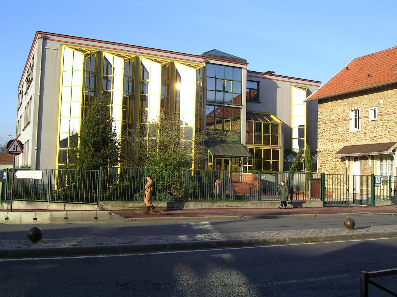 Livry-Gargan (Seine-Saint-Denis) - Bibliothèque René-Cassin Décembre 2006 Photo personnelle (own work) de Marianna